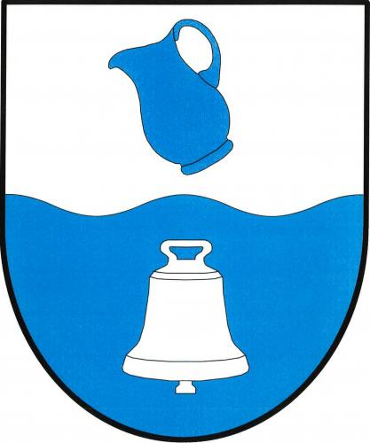 Dobrá Voda u Pacova, znak obce